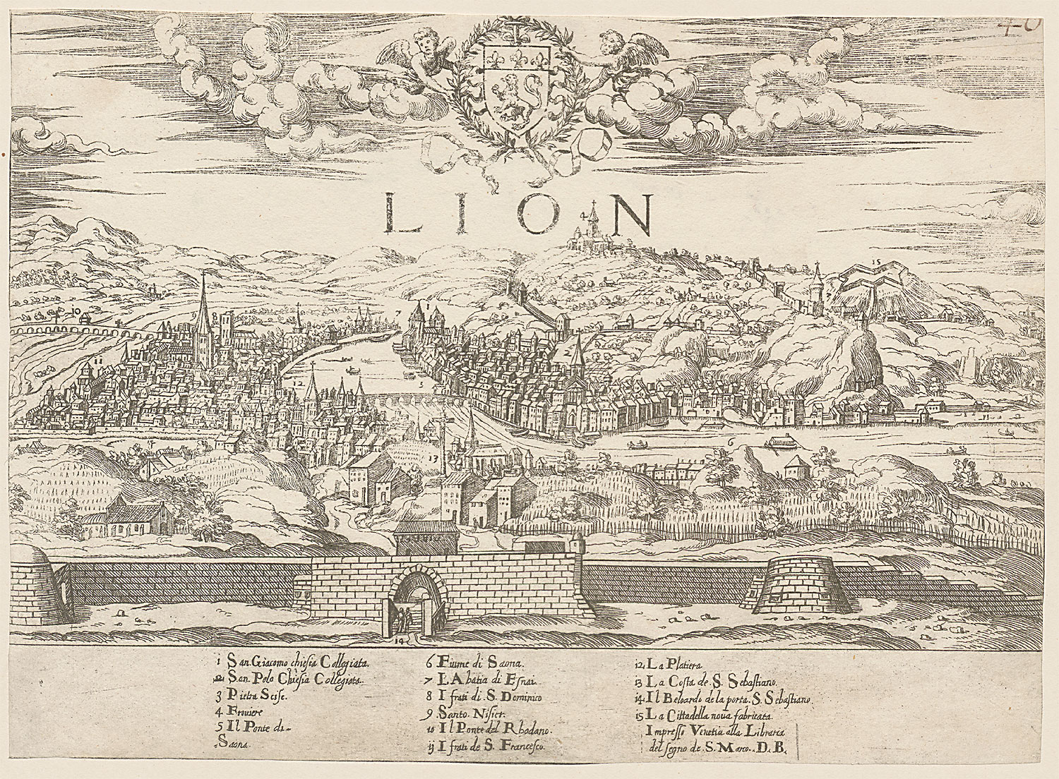 Ansicht von Lyon; Kupferstich, um 1570